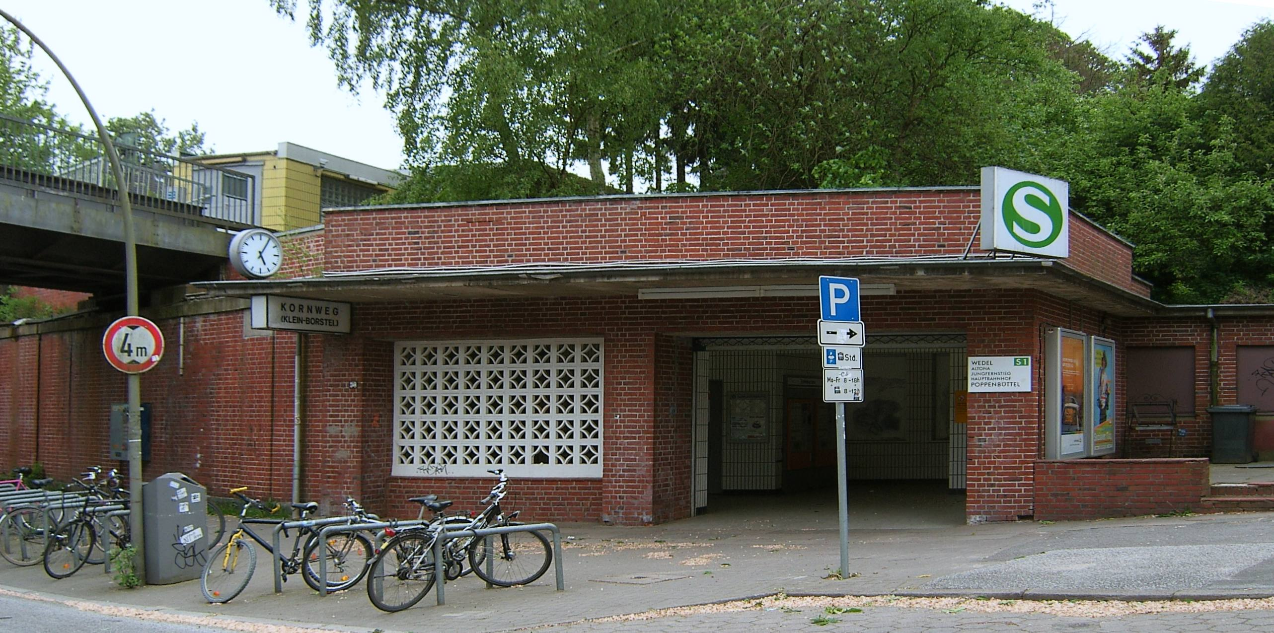 Bildbeschreibung: Hamburg, Klein Borstel, S-Bahnstation "Kornweg" Fotograf: selbst Datum: 28.5.2006